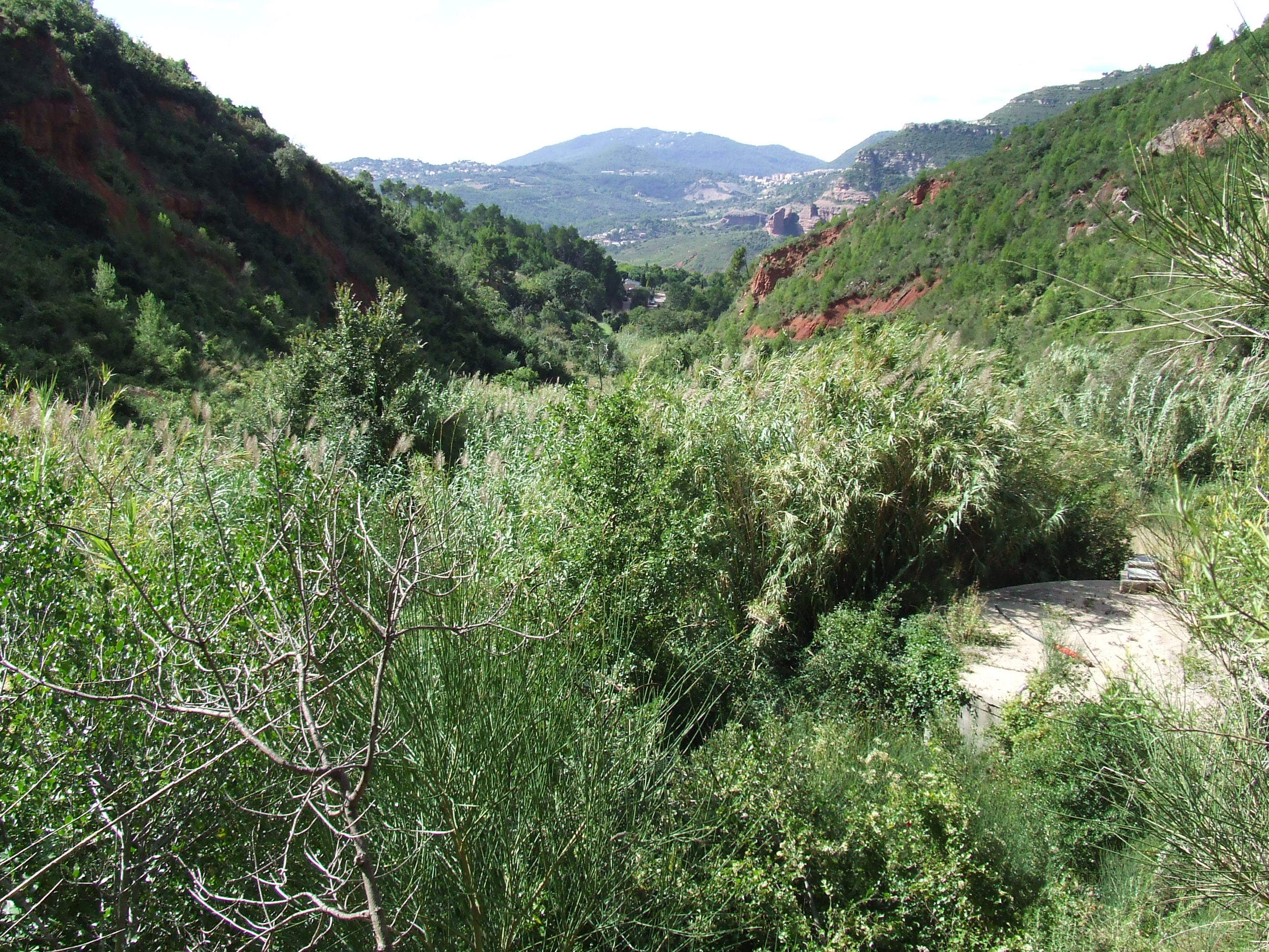 Torrent de Llòbrega (Riells del Fai, Bigues i Riells, Vallès Oriental)